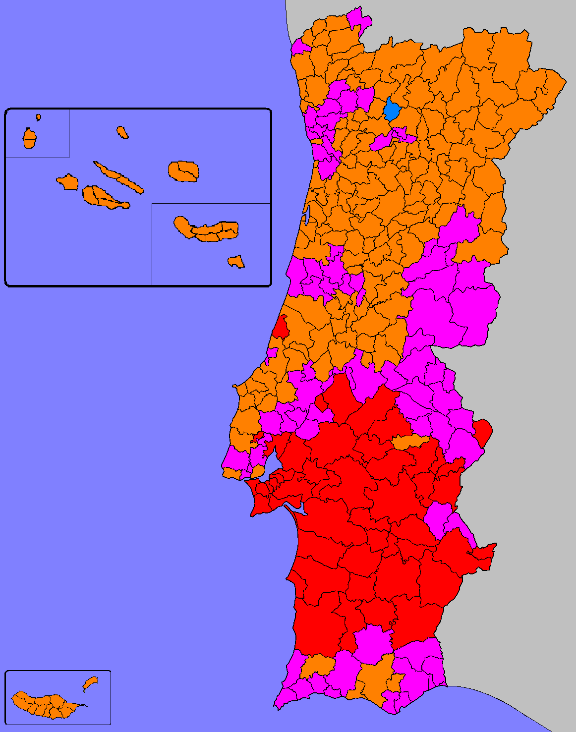 Mapa ilustrativo do partido mais votado por Concelho